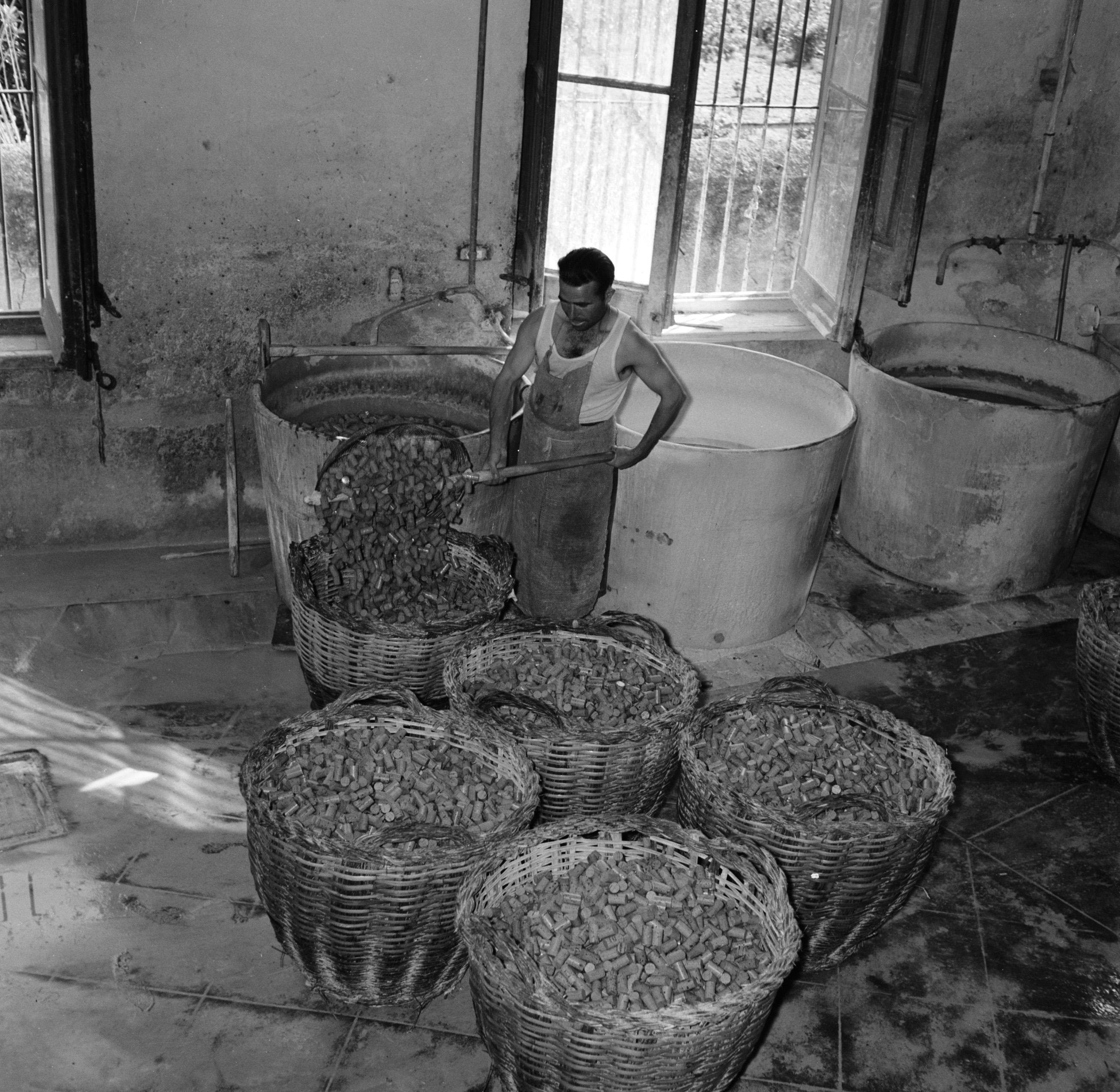 Collectie / Archief : Fotocollectie Van de Poll Reportage / Serie : Kurkindustrie in Llagostera (regio Catalonië) Beschrijving : Arbeider haalt de gewassen kurken uit de steriliserende vloeistof Datum : ongedateerd Locatie : Llagostera, Spanje Trefwoorden : arbeiders, fabrieken, industrie, kurk Fotograaf : Poll, Willem van de Auteursrechthebbende : Nationaal Archief Materiaalsoort : Negatief (6x6) Nummer archiefinventaris : bekijk toegang 2.24.14.02 Bestanddeelnummer : 254-0720